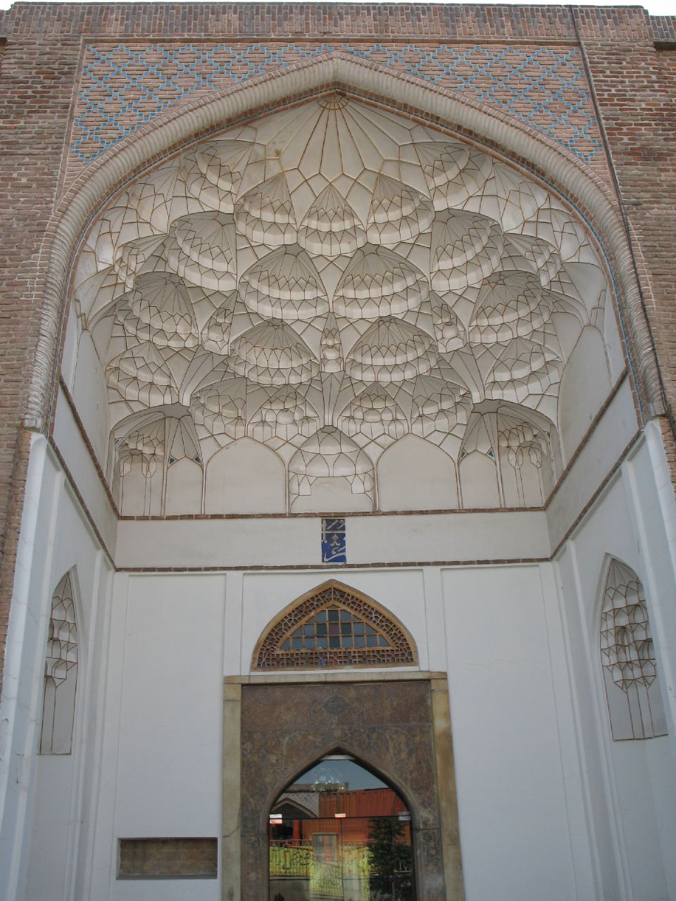 Saheb al-amr mosque, Tabriz, Iran